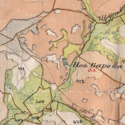 Деревня Новое Ворово (ныне Тупицыно) на карте 1850 года